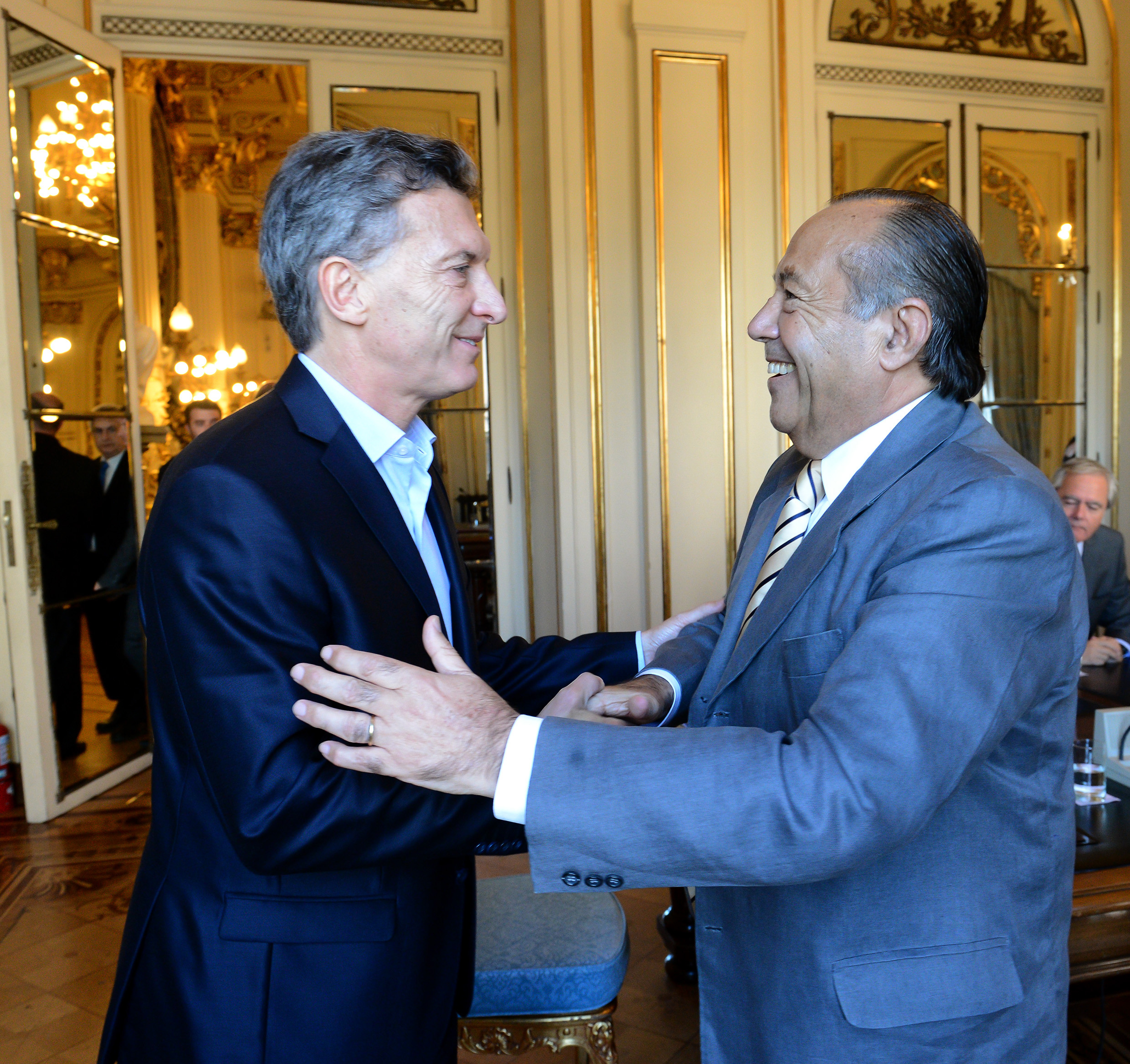 El presidente Mauricio Macri recibió a un grupo de senadores de diversas fuerzas políticas y de diferentes provincias, que integran el interbloque Federal.